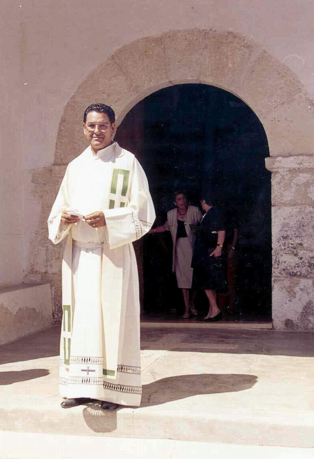 Don Antonio Díaz Tortajada en la ermita de San Roque en Torrebaja (Valencia), durante las fiestas patronales (1995).